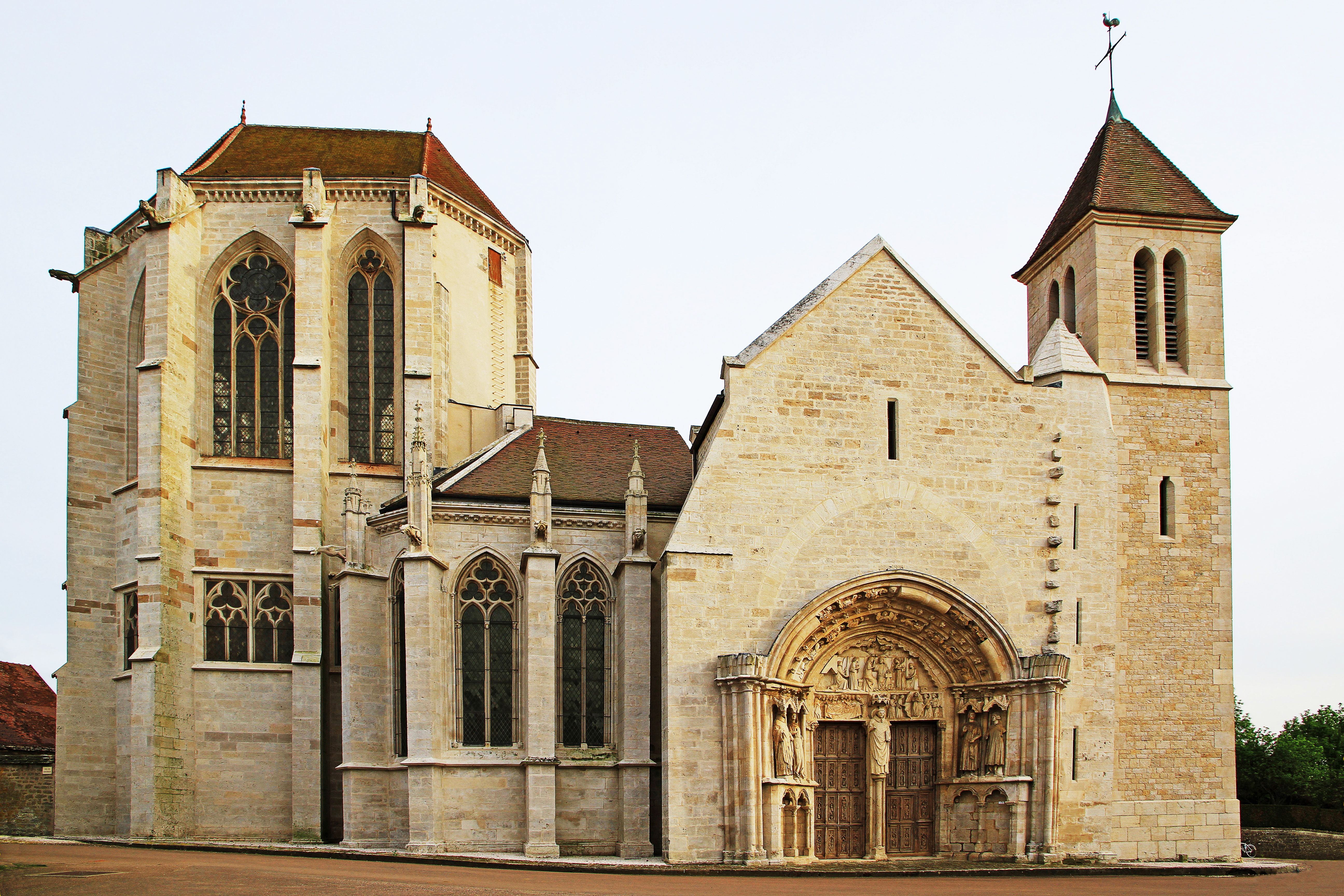 Église de Saint-Thibault en Côte-d'Or